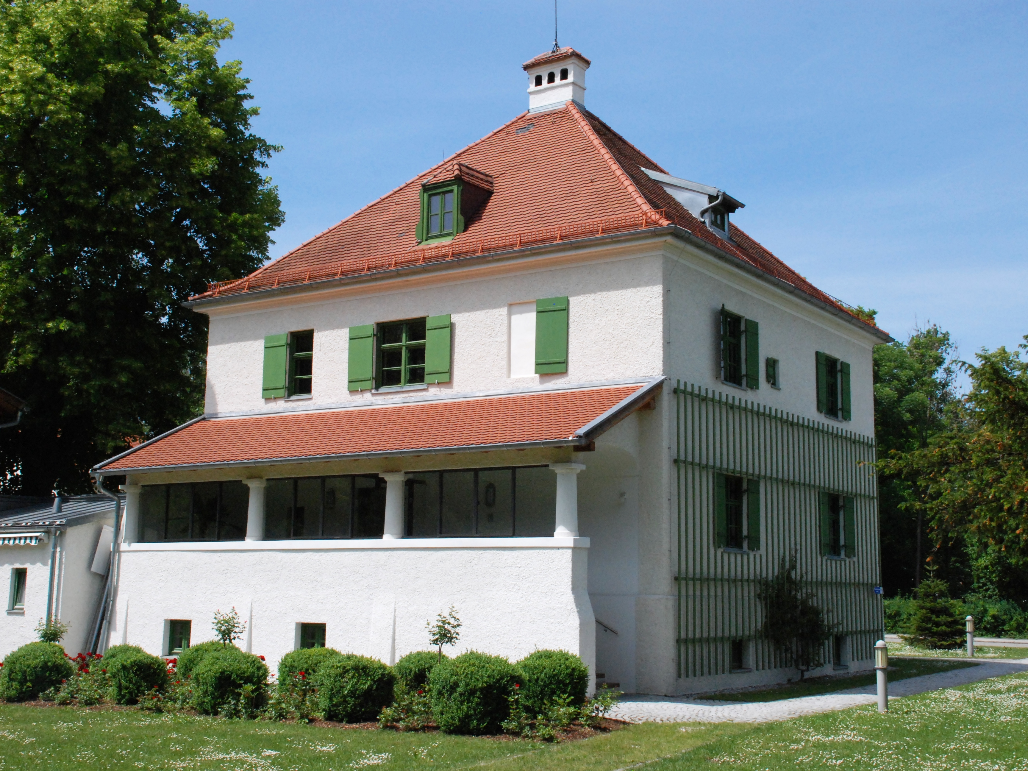 Denkmalgeschütztes früheres Wohnhaus des Heraldikers Professor Otto Hupp in Oberschleißheim, Landkreis München, Hirschplanallee 1